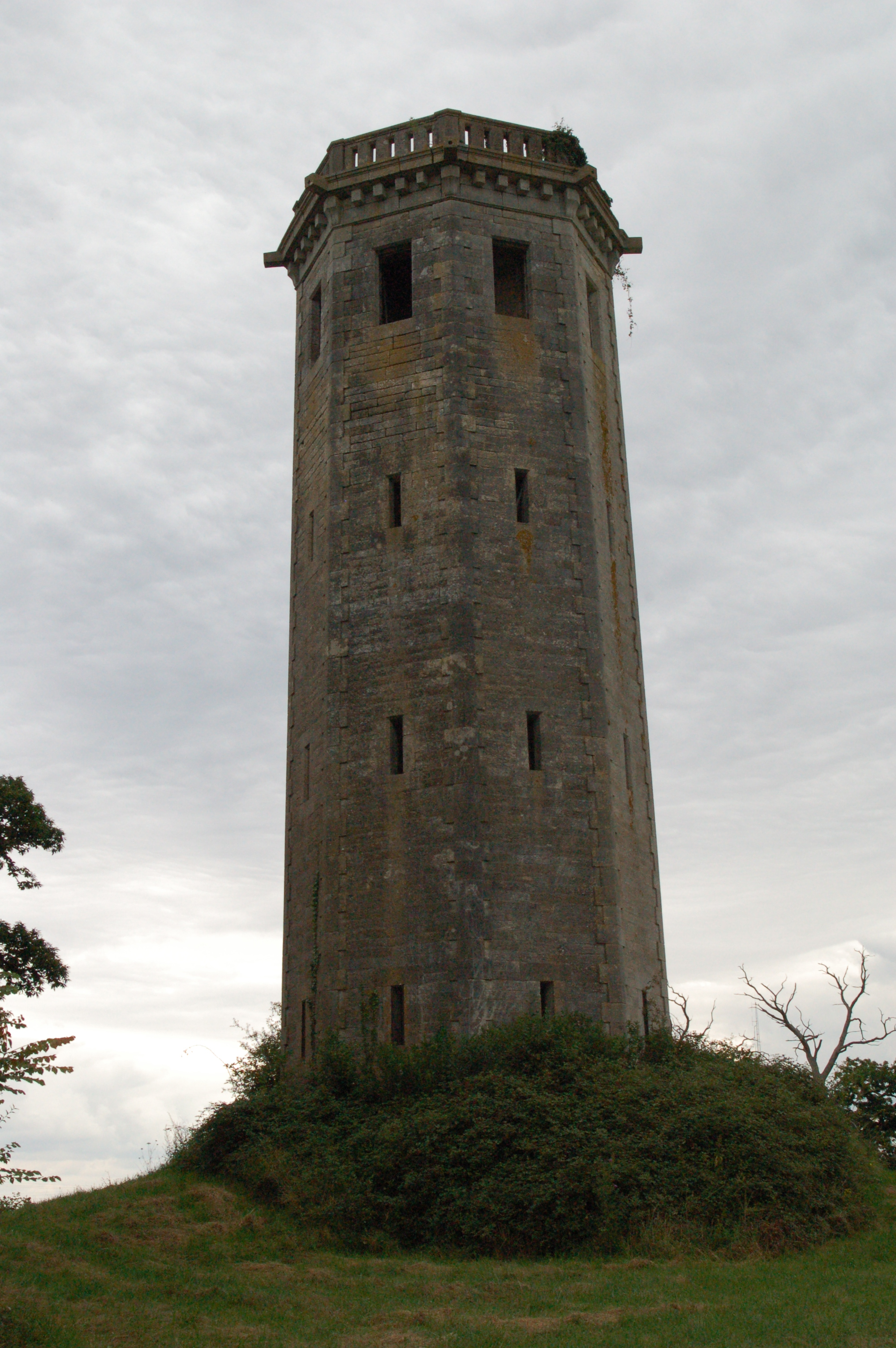 Vue générale de l'édifice